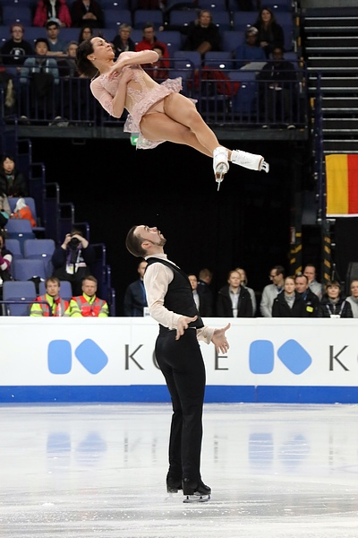 Ксения Столбова и Федор Климов (Россия) на чемпионате мира 2017